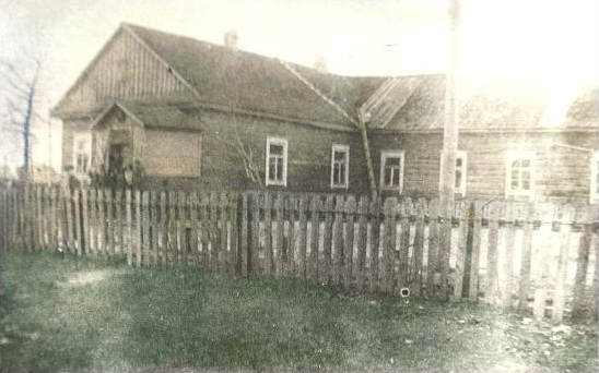 Сярэдняя школа № 2 г. Мар’іна Горка, 1948. Да вайны ў гэтым будынку знаходзіўся райсабес і суд.